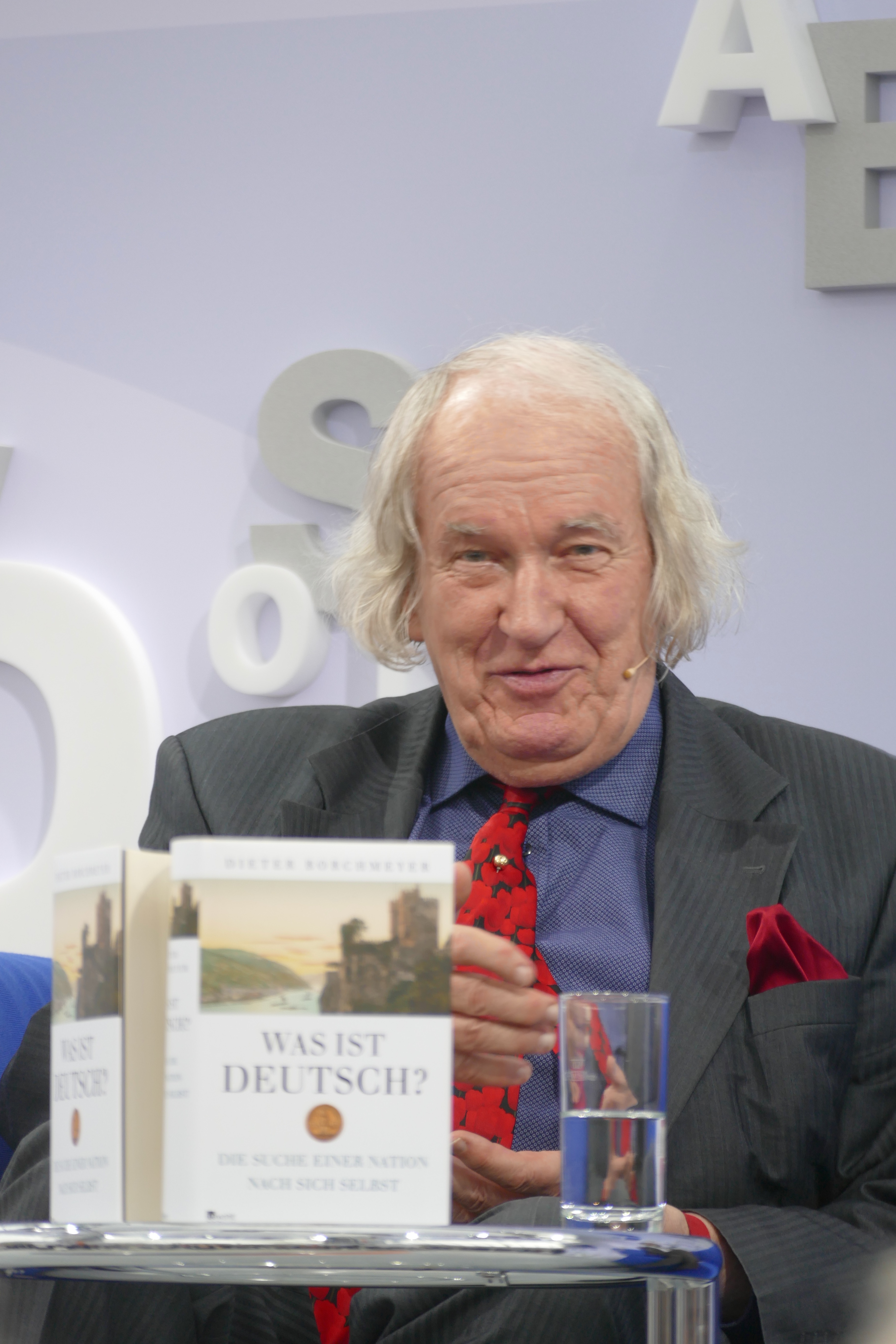 Dieter Borchmeyer stellt auf der Leipziger Buchmesse sein Buch "Was ist deutsch?" vor